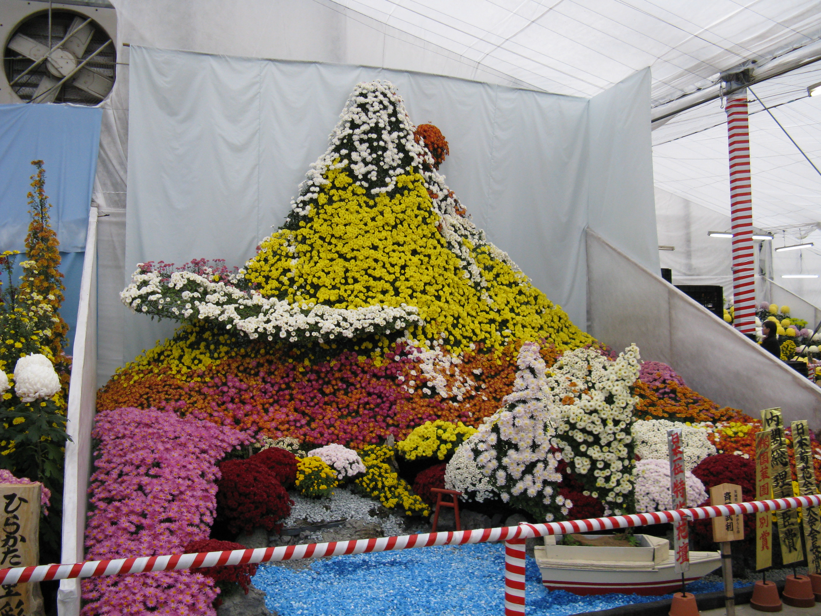 国華園の菊花展